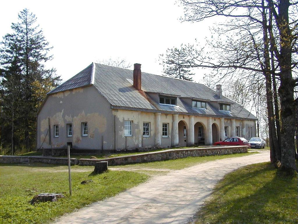 Annas muižas saimniecības ēka 2002-05-04